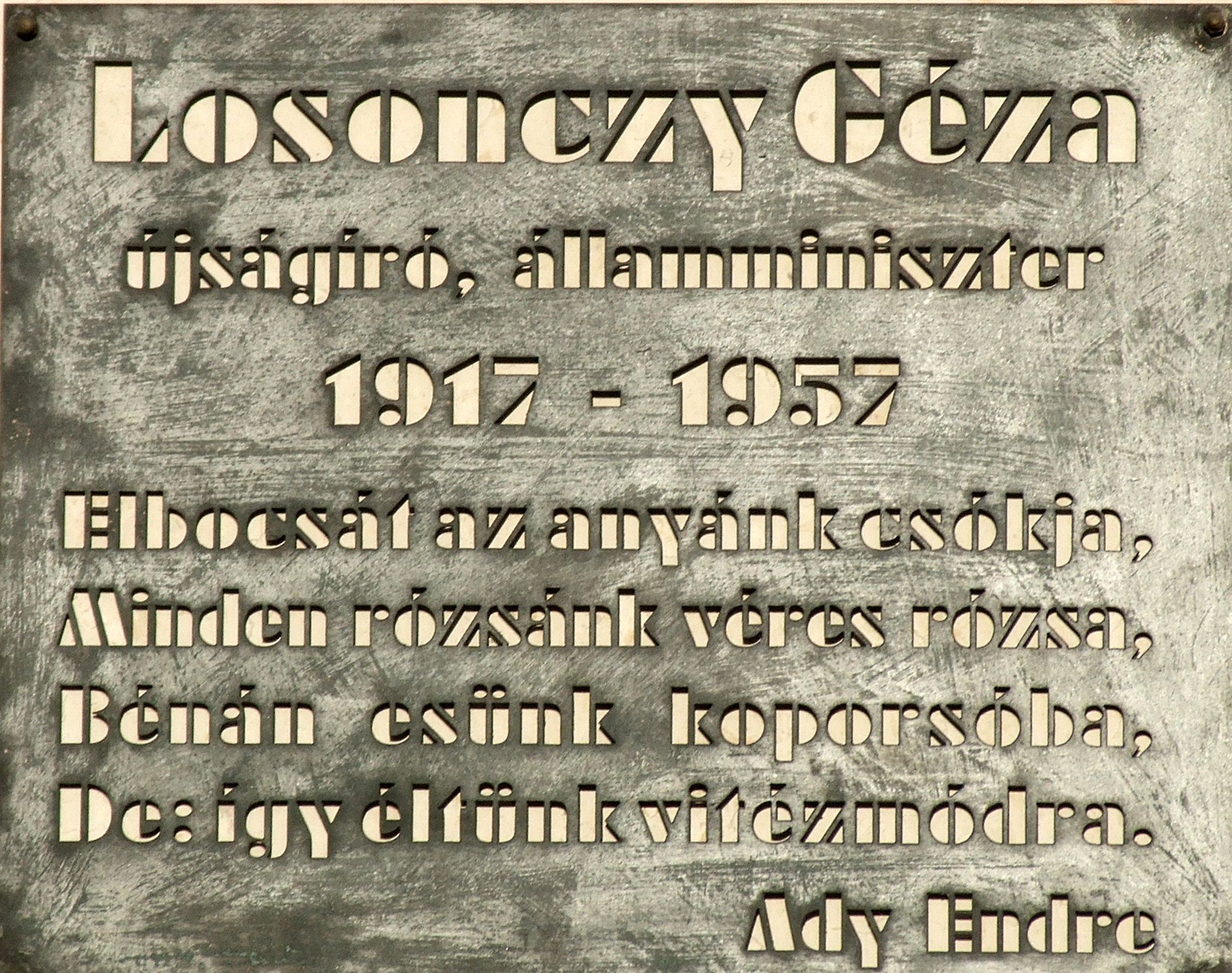 Losonczy Géza (1917-1957) mártír emléktáblája Kossuth tér 11.